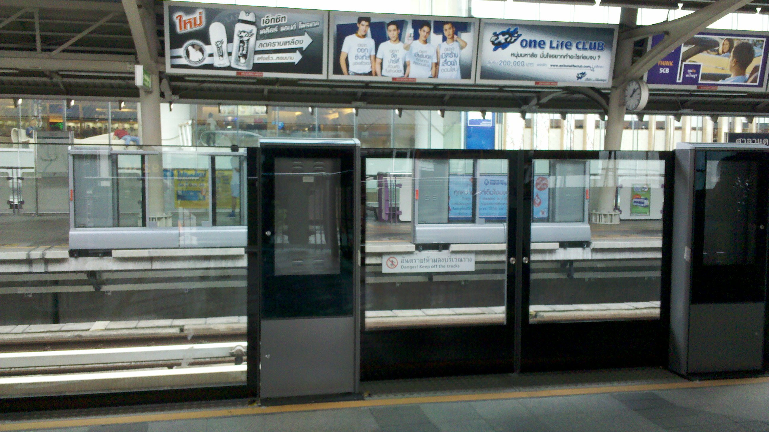 พื้นที่ทำประตูกั้นชานชาลาของรถไฟฟ้าบีทีเอส สายสีลม สถานีศาลาแดง